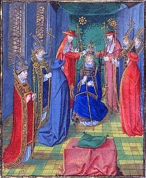 Couronnement de Benoît XIII par les carinaux de Neufchâtel et de Saint-Martial 28 septembre 1394